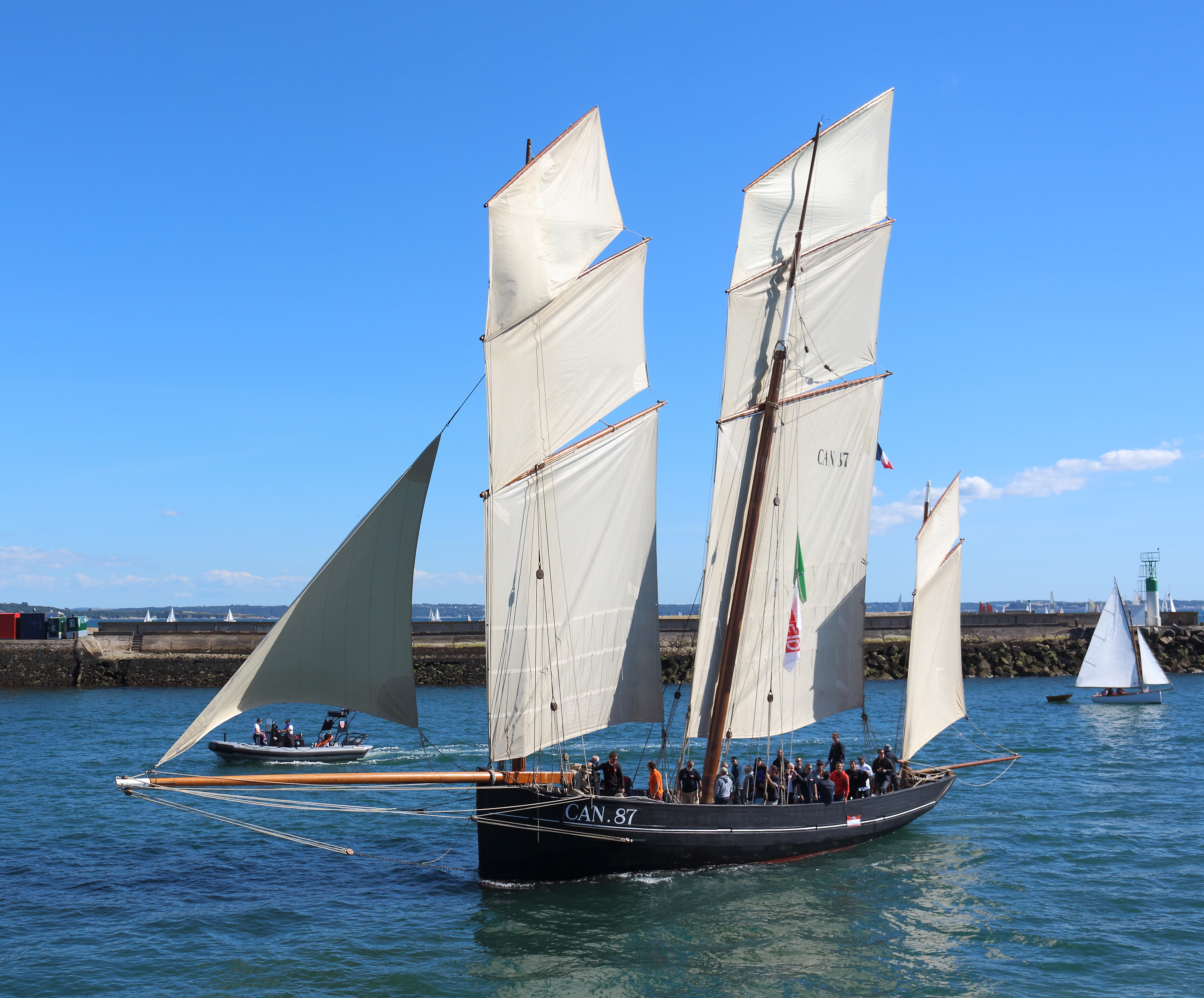 La Cancalaise, de retour de promenade le 14 juillet 2016 à l'entrée du port de commerce de Brest (Finistère, Bretagne, France).